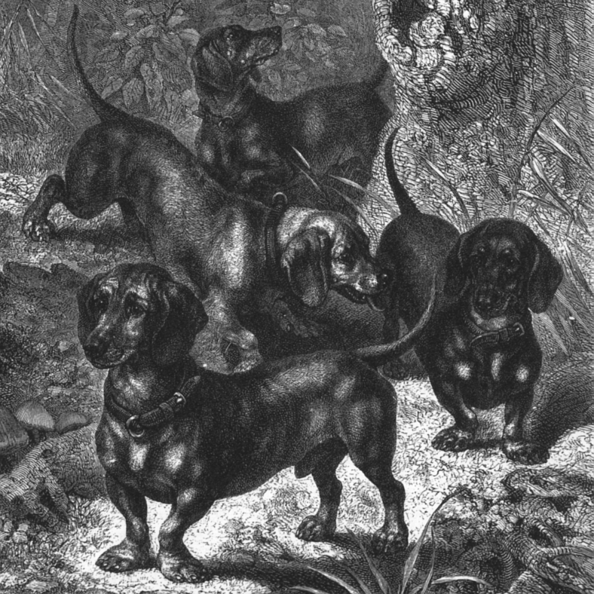 Dachshunde, gezeichnet von F. Specht, 1772. Zuschreibung zu category:Friedrich Specht fraglich, da dieser von 1839 bis 1909 gelebt hat.